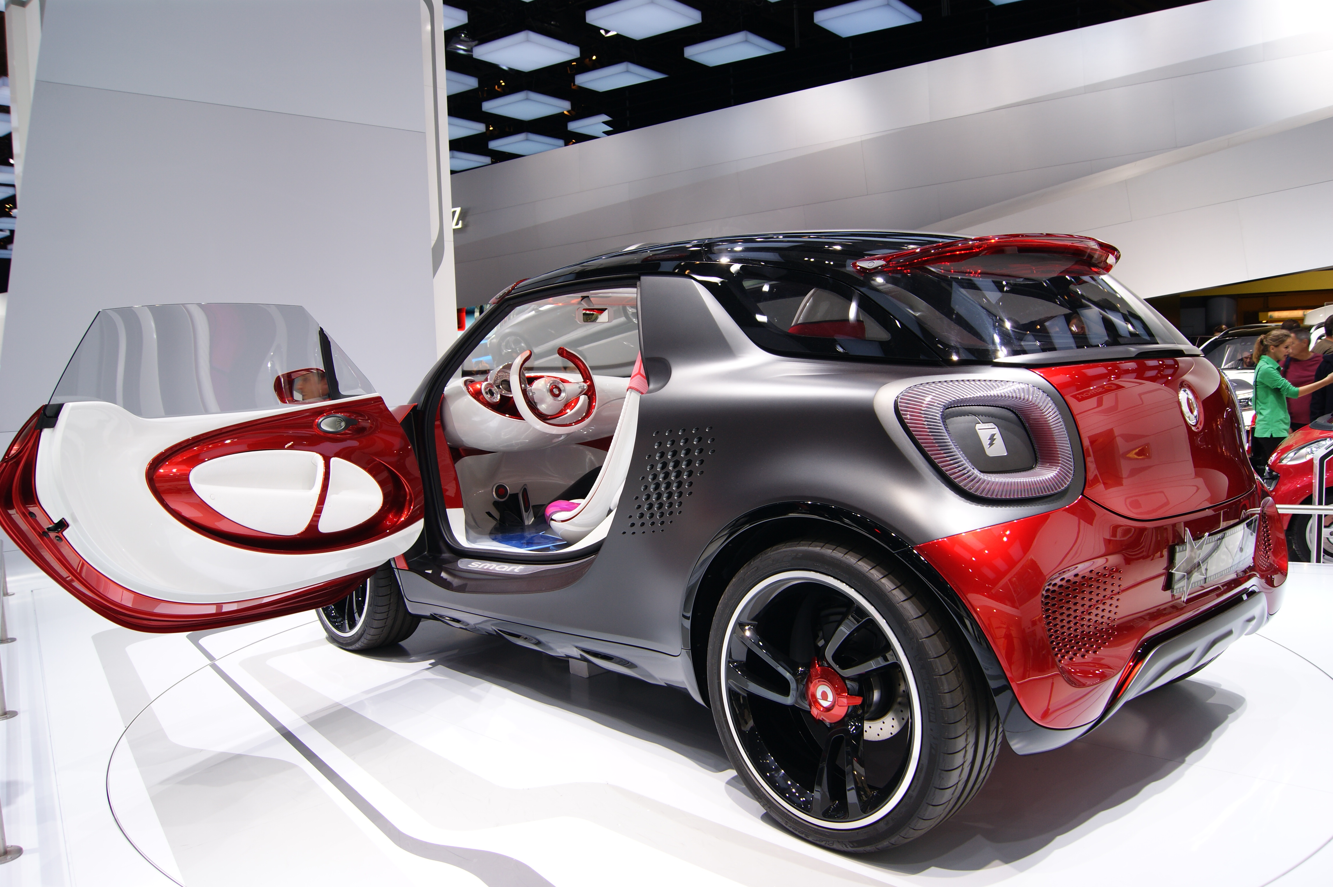 Smart - Forstars